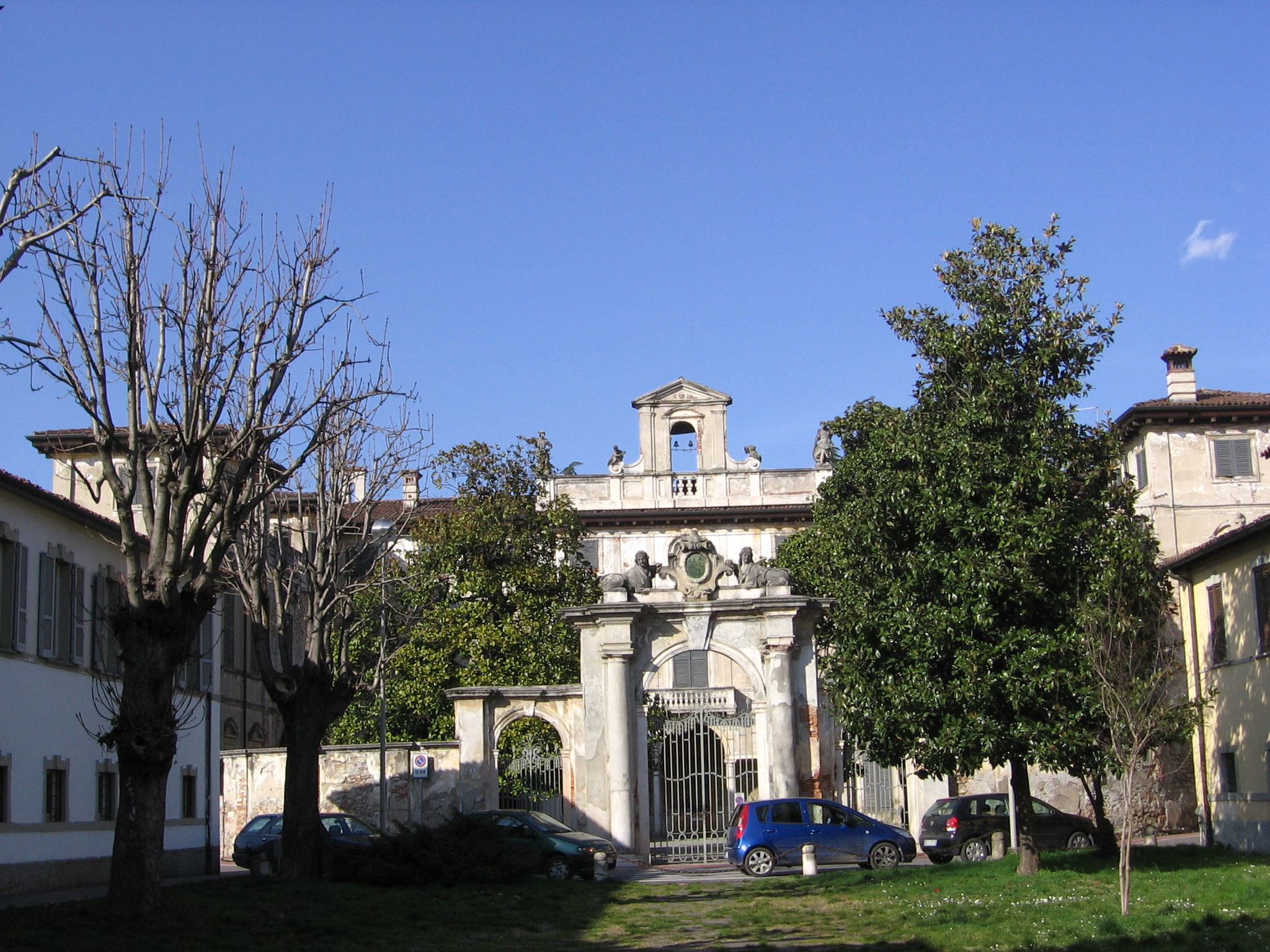 Pedrengo, Bergamo, Italy